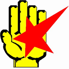 Эмблема ССО "Альтаир"